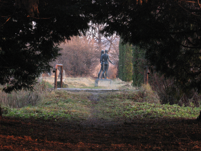 Парк, расположенный вокруг Олесского замка